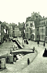 Bildausschnitt, Gospertbach in Eupen zur Zeit des Bürgermeisters Peter Becker